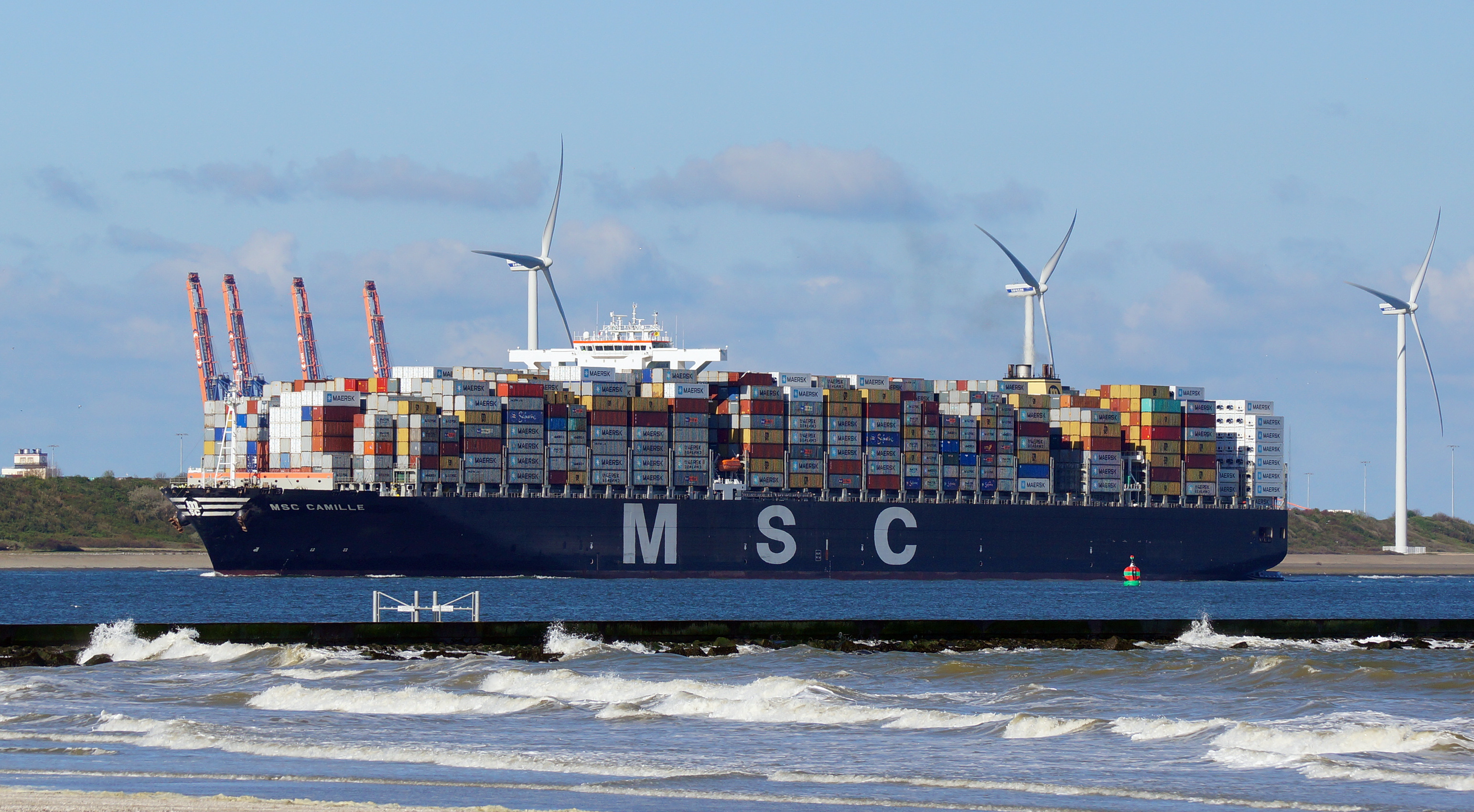 Maasmond 27-4-2015